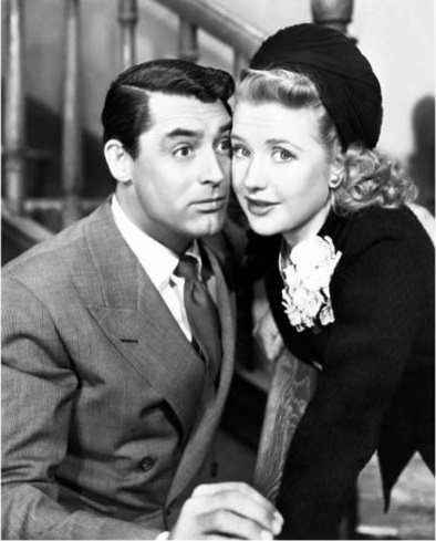 Publicity photo of Cary Grant & Priscilla Lane taken for film Arsenic and Old lace (1944). See also film still. No copyright notice.